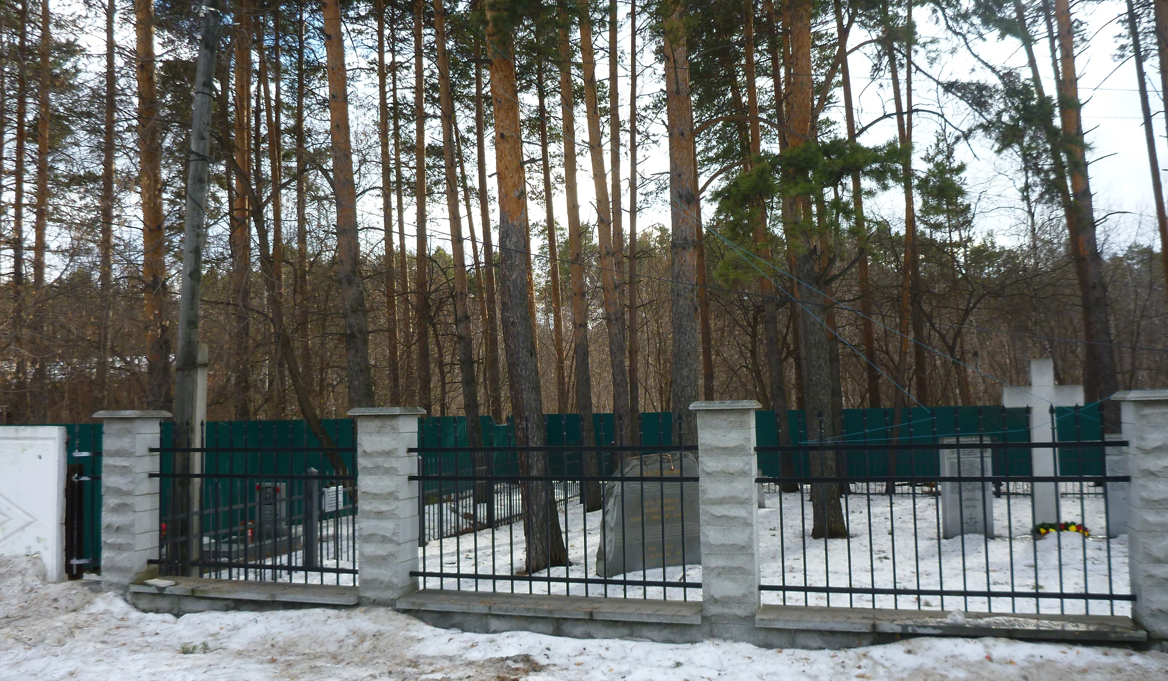 Акт примирения после Великой Отечественной войны могила Виктора Максимова (умершего в 2018 году) за оградой немецкого кладбища военнопленных Екатеринбург, фото 2020 года